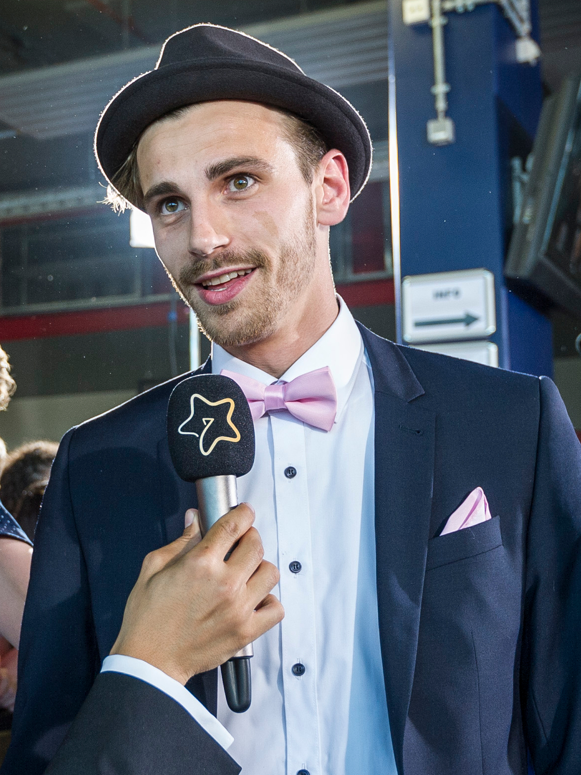 Fynn Kliemann am Blue Carpet des Webvideopreises Deutschland 2017